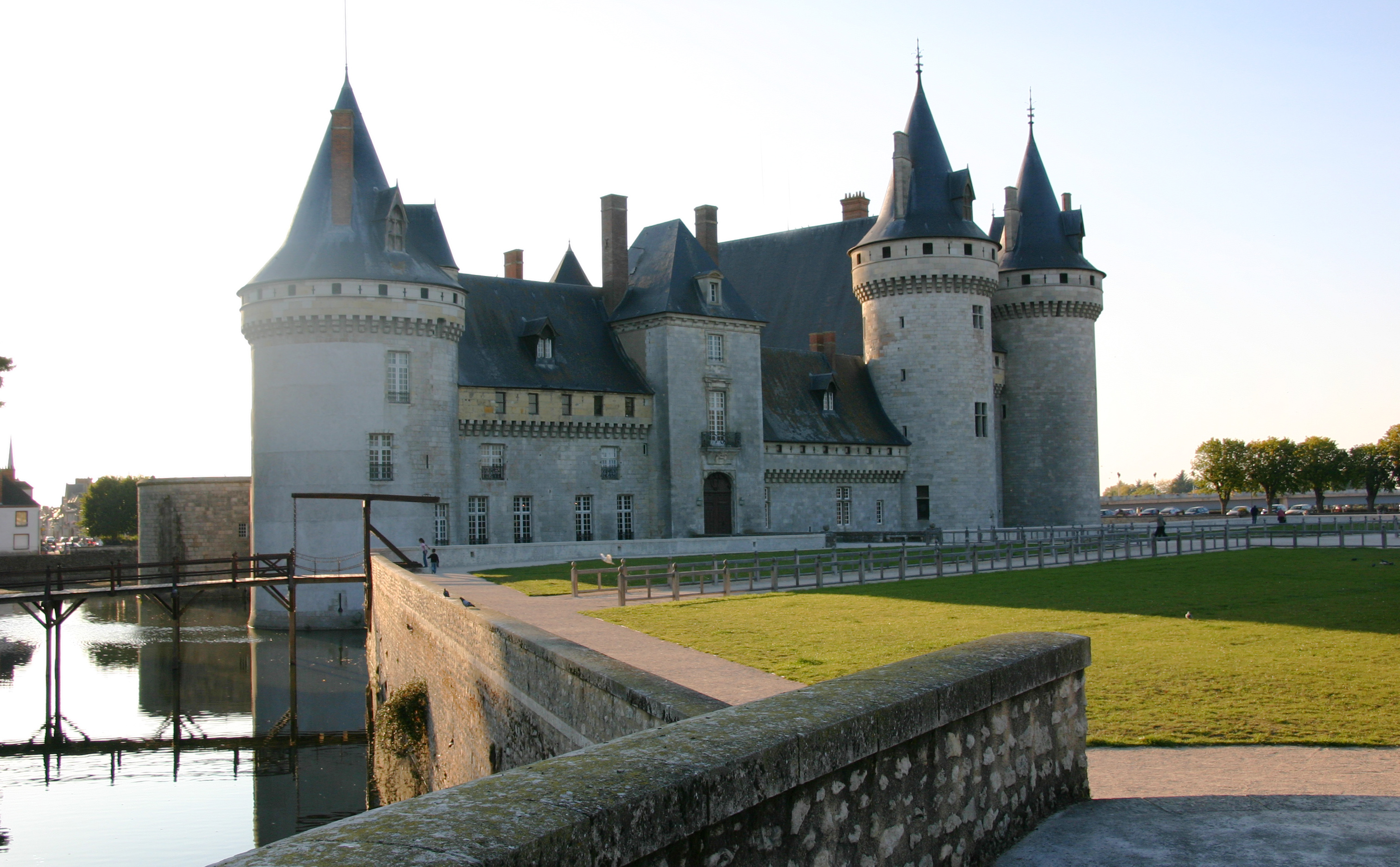 Schloss Sully-sur-Loire